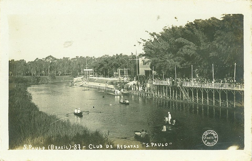 Clube de Regatas Tietê, na cidade de São Paulo, em 1920.